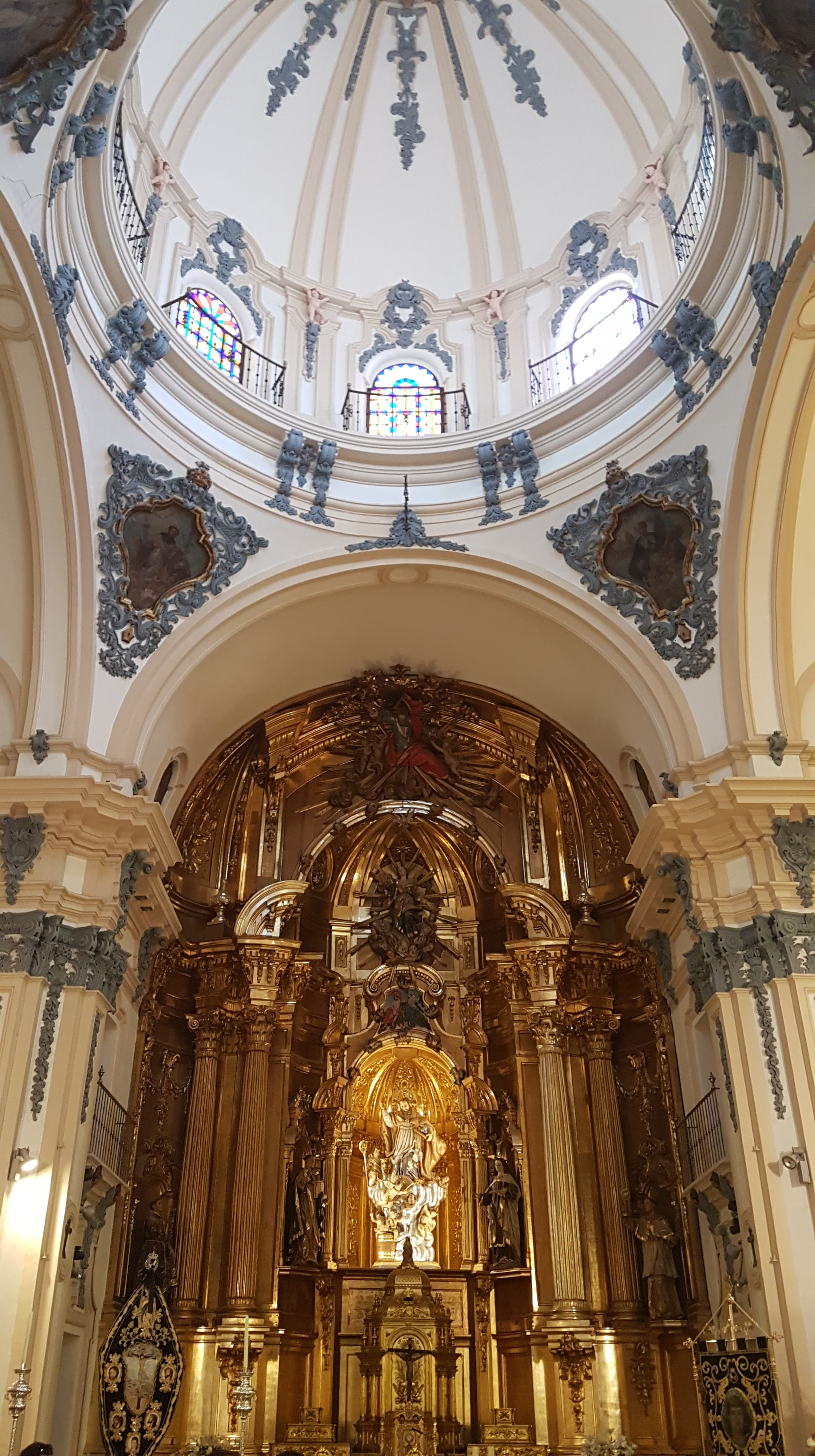 Interior de la Iglesia de San Nicolás de Bari de Murcia (Región de Murcia, España)